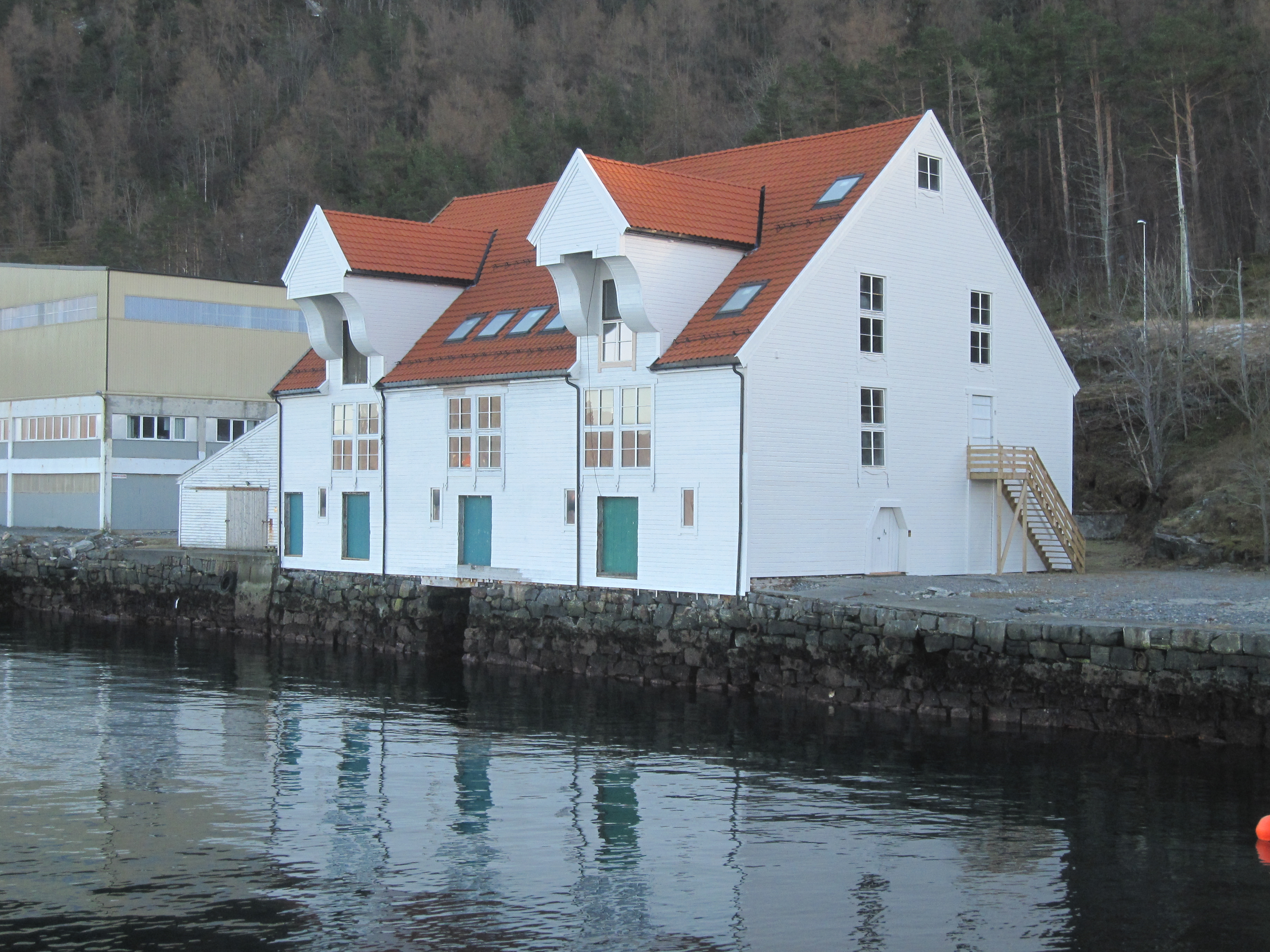 Friis bua